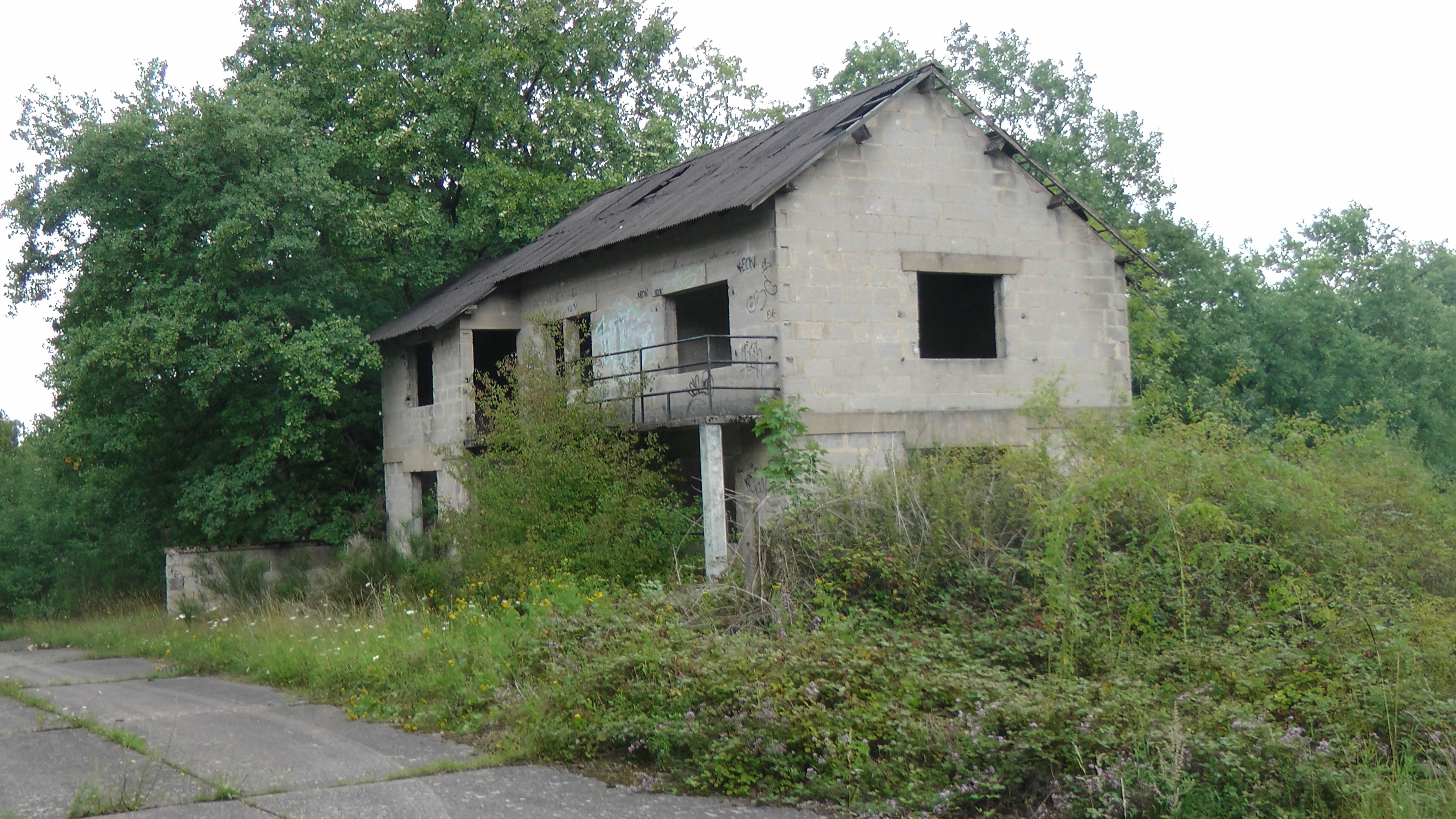 Ehemaliger französischer Truppenübungsplatz in Trier (Deutschland) Former french military trainig area in Trier (Germany)